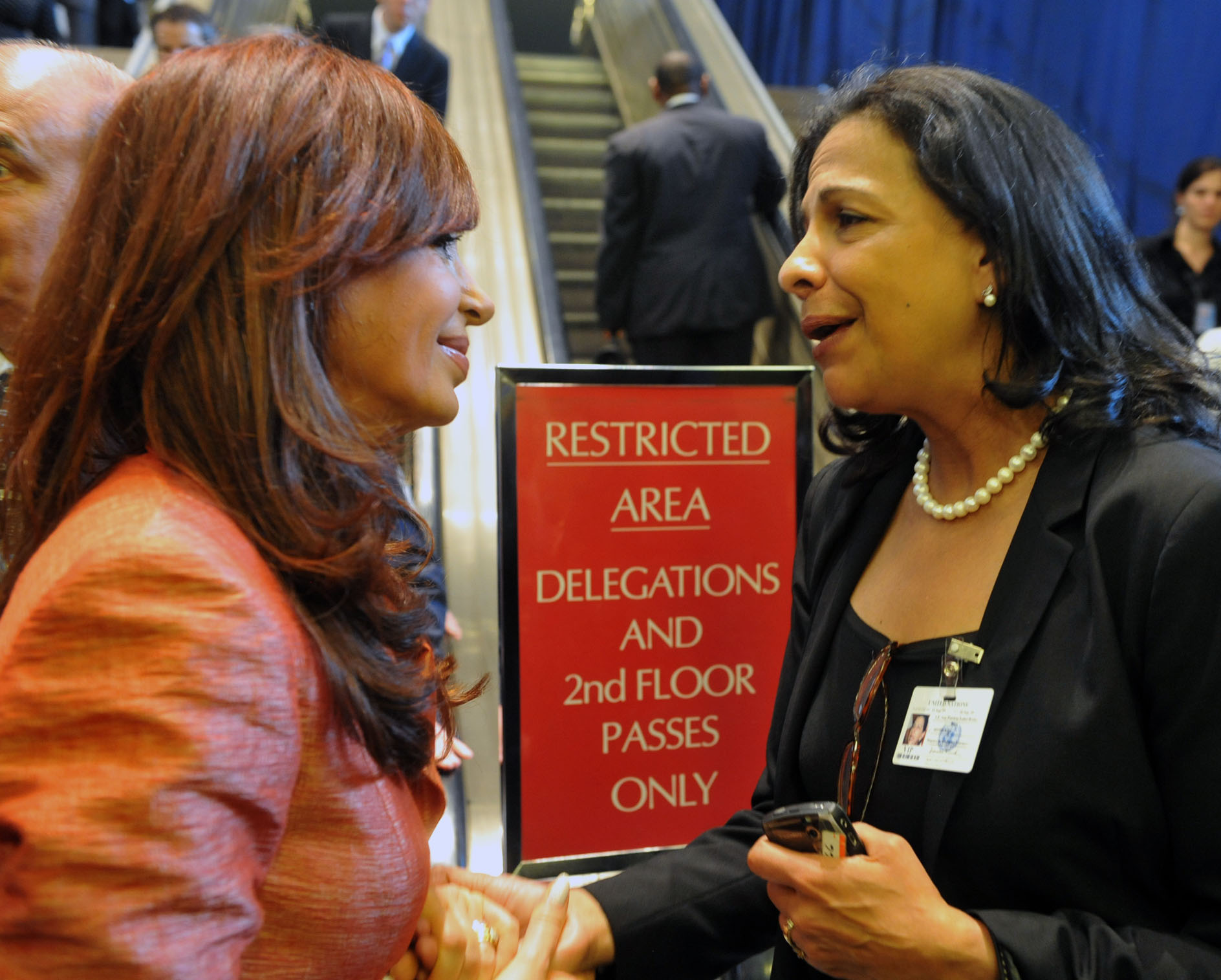 Cristina Fernández junto a la canciller del gobierno democrático de Honduras, Patricia Rodas, en la sede de la ONU